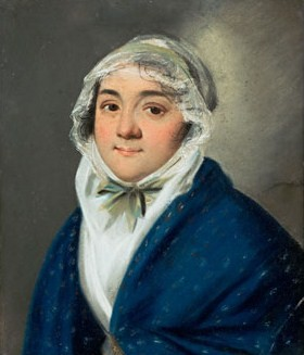 лизавета Петровна Чиркова, урождённая Татищева (1764—1823)